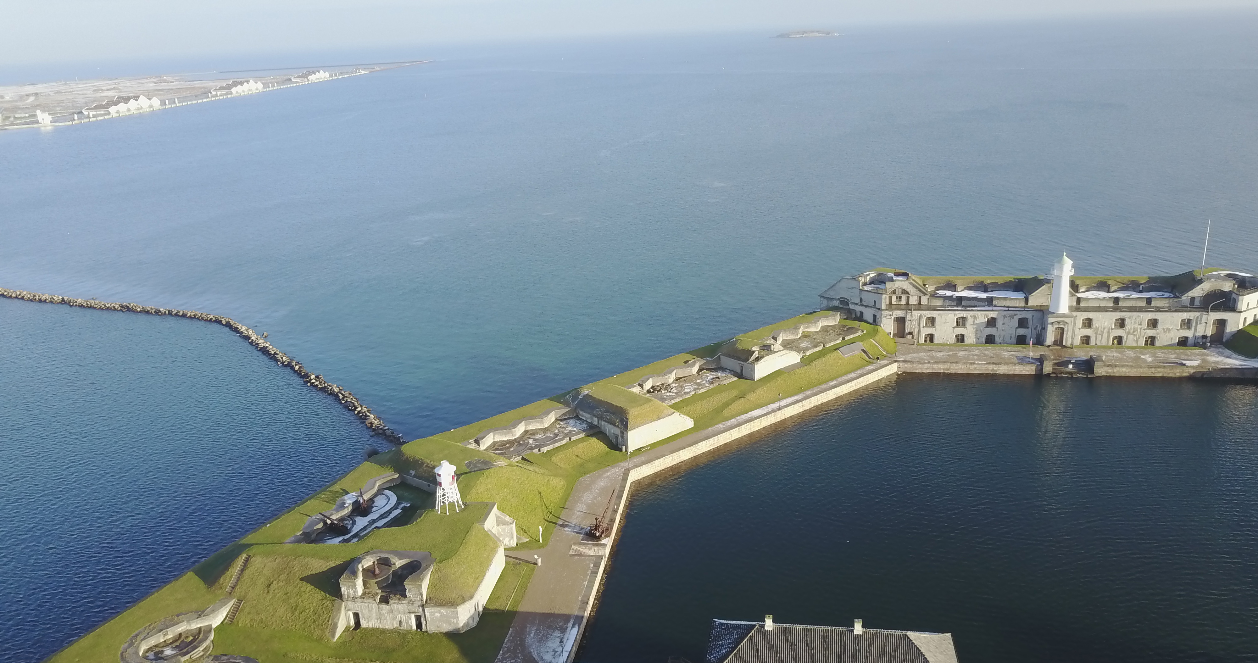 Freesky.dk Drone foto